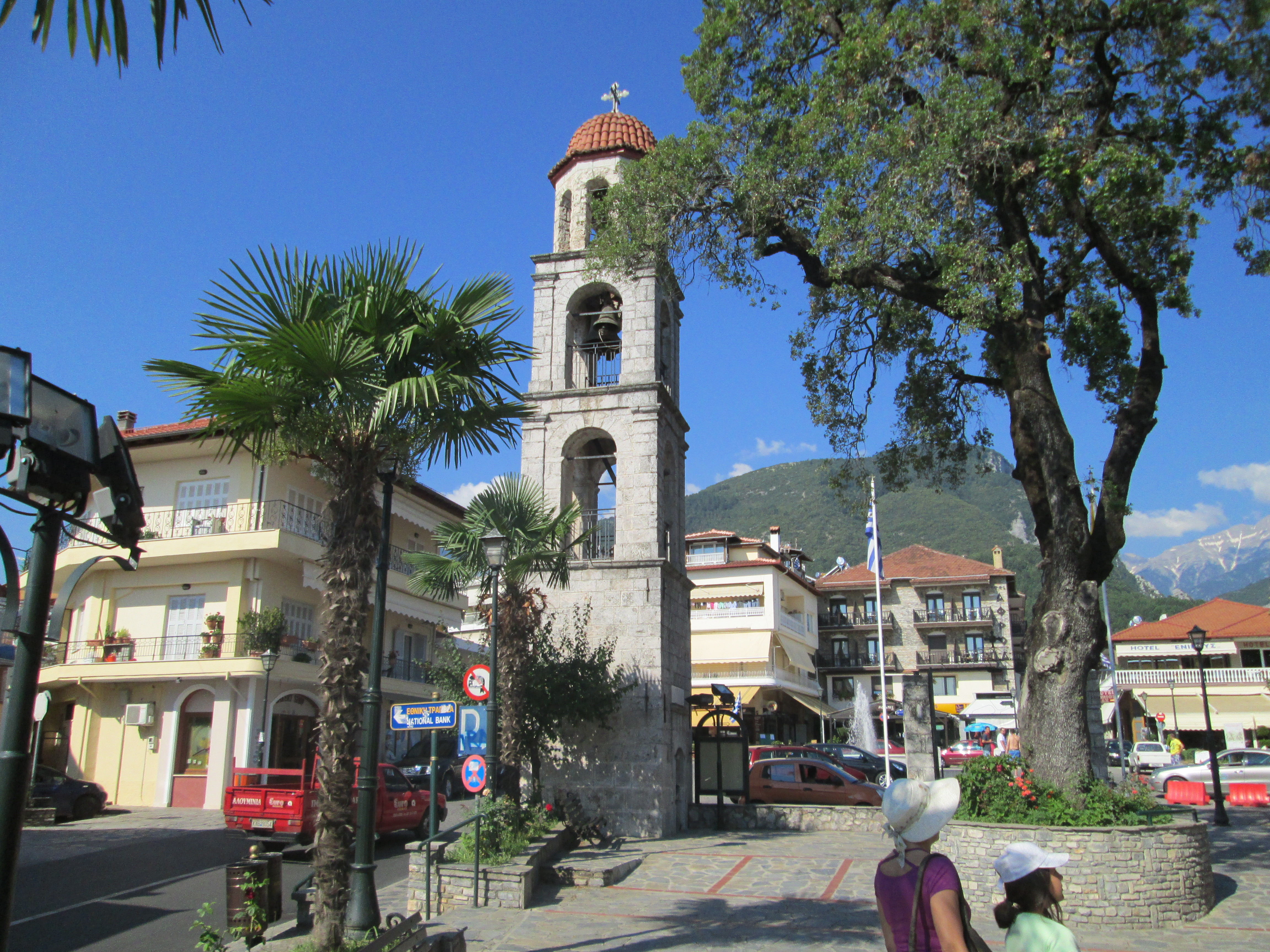 Tsintza Bairi, Litochoro 602 00, Greece